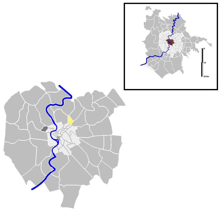 Salario